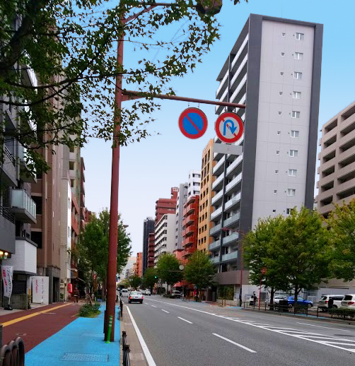 那の津通沿いの荒戸の風景